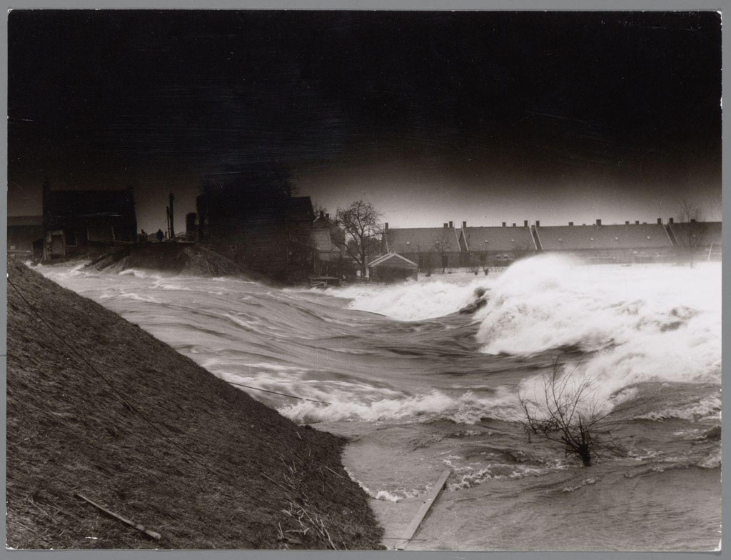 Nationaal Archief Beschrijving: Watersnood 1953. Dijkdoorbraak in de Alblasserwaard bij Papendrecht Datum: 1 februari 1953 Bestanddeelnummer 123-1318 Vervaardiger: Scheermeyer URL: [1] Voor meer informatie over het Nationaal Archief: Voor meer foto's uit deze en andere collecties, bezoek onze Beeldbank: U kunt ons helpen onze kennis van de fotocollecties te verrijken door tags en commentaren toe te voegen. Herkent u mensen of locaties of heeft u een bijzonder verhaal te vertellen bij één van de foto's, laat dan een reactie achter (als u ingelogd bent bij Flickr) of stuur een mailtje naar